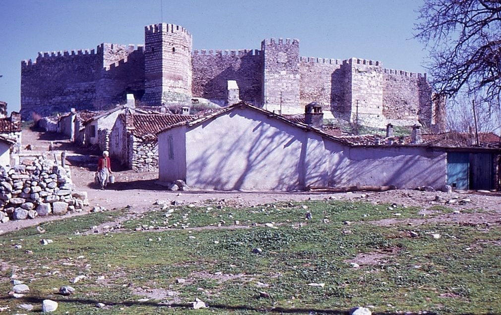 Citadelle et village de Selçuk en 1970